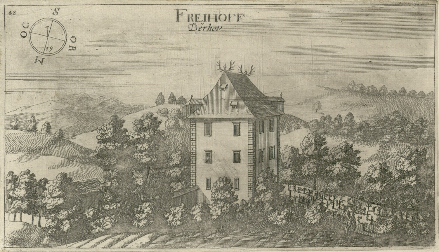 Dvorec Vrhovo (Feihof)